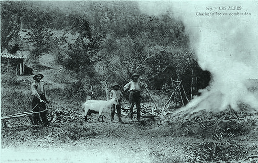 Charbonniers et leur chèvre